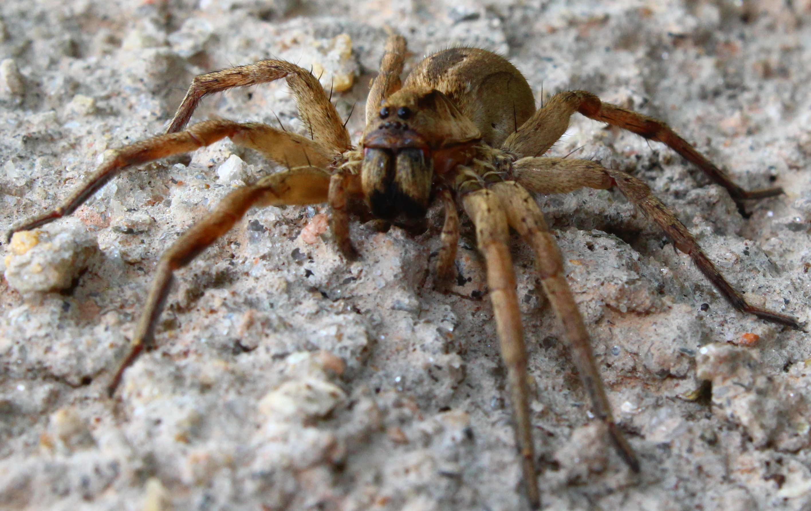 Aranha-Lobo, com close no aparato visual.